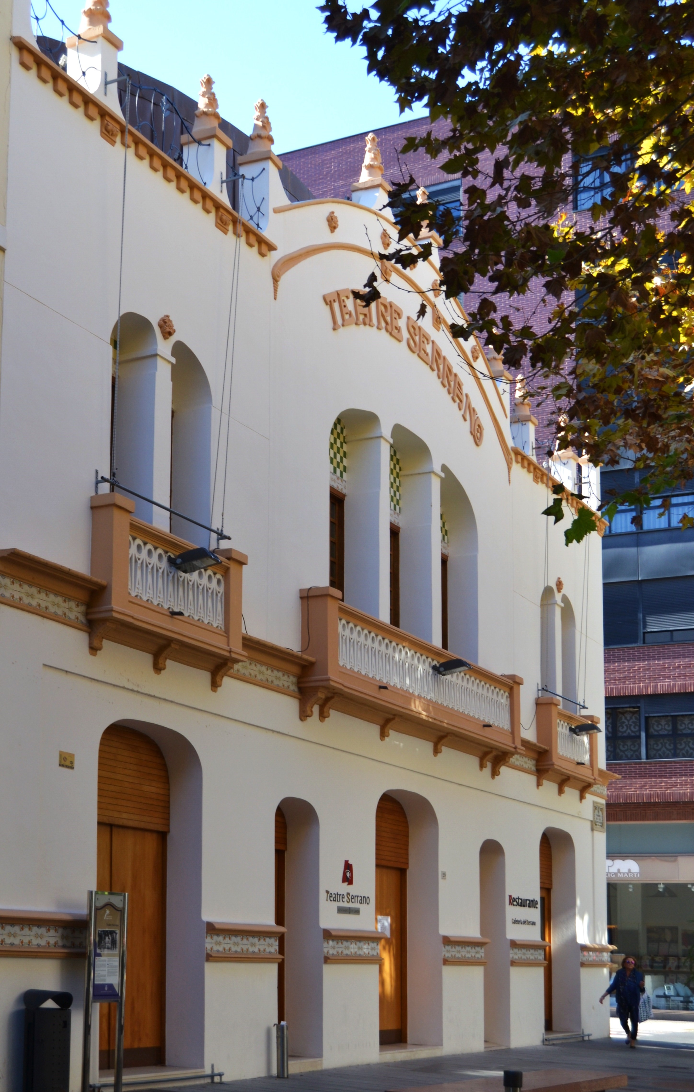 Teatre Serrano de Gandia